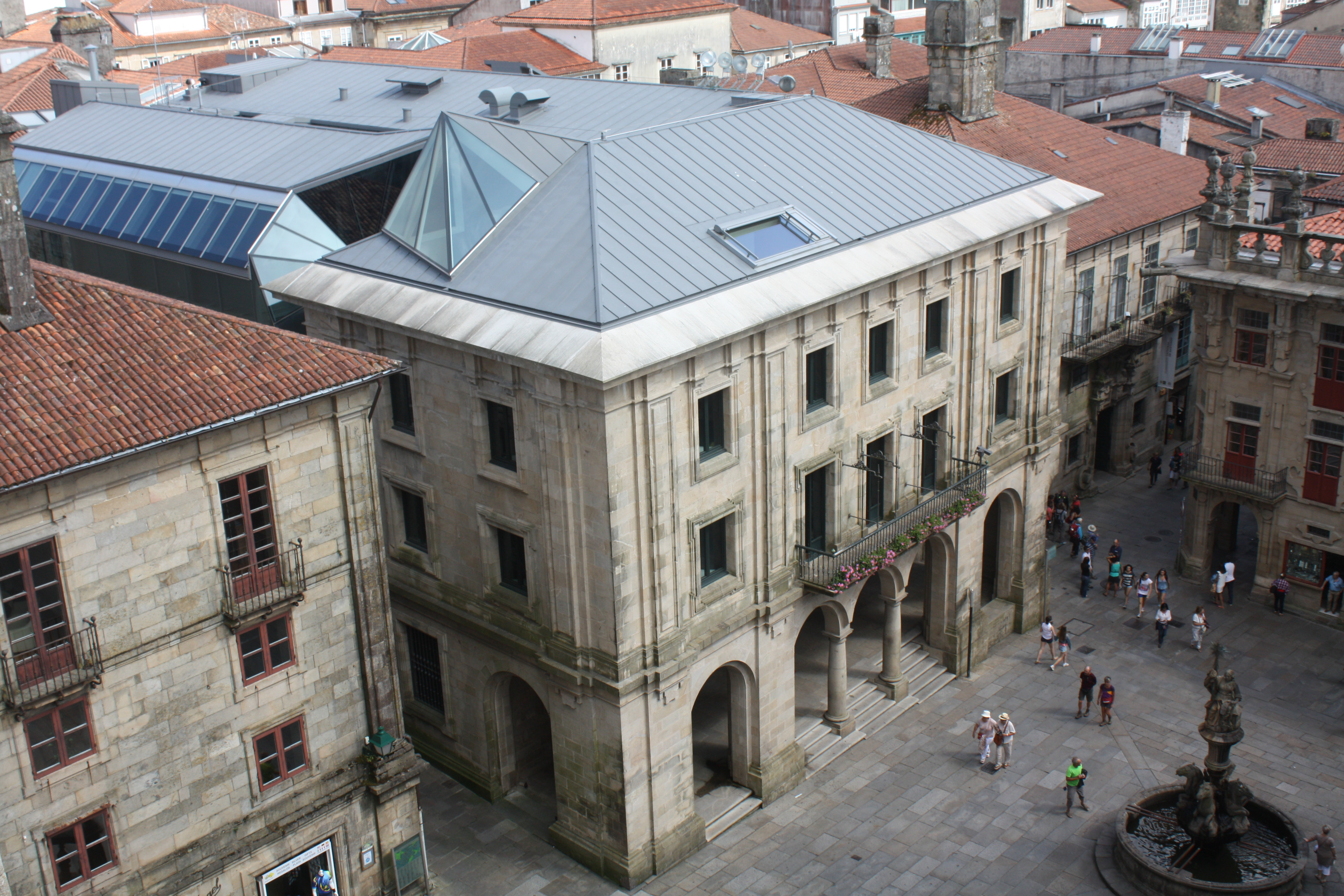 O Museo das Peregrinacións, na praza de Praterías de Santiago de Compostela.